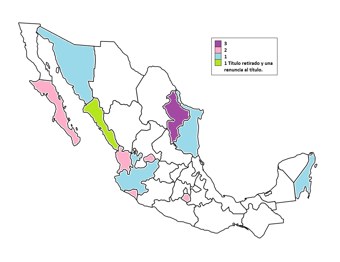 Número de coronas de Mexicana Internacional ganadas por los estados mexicanos.